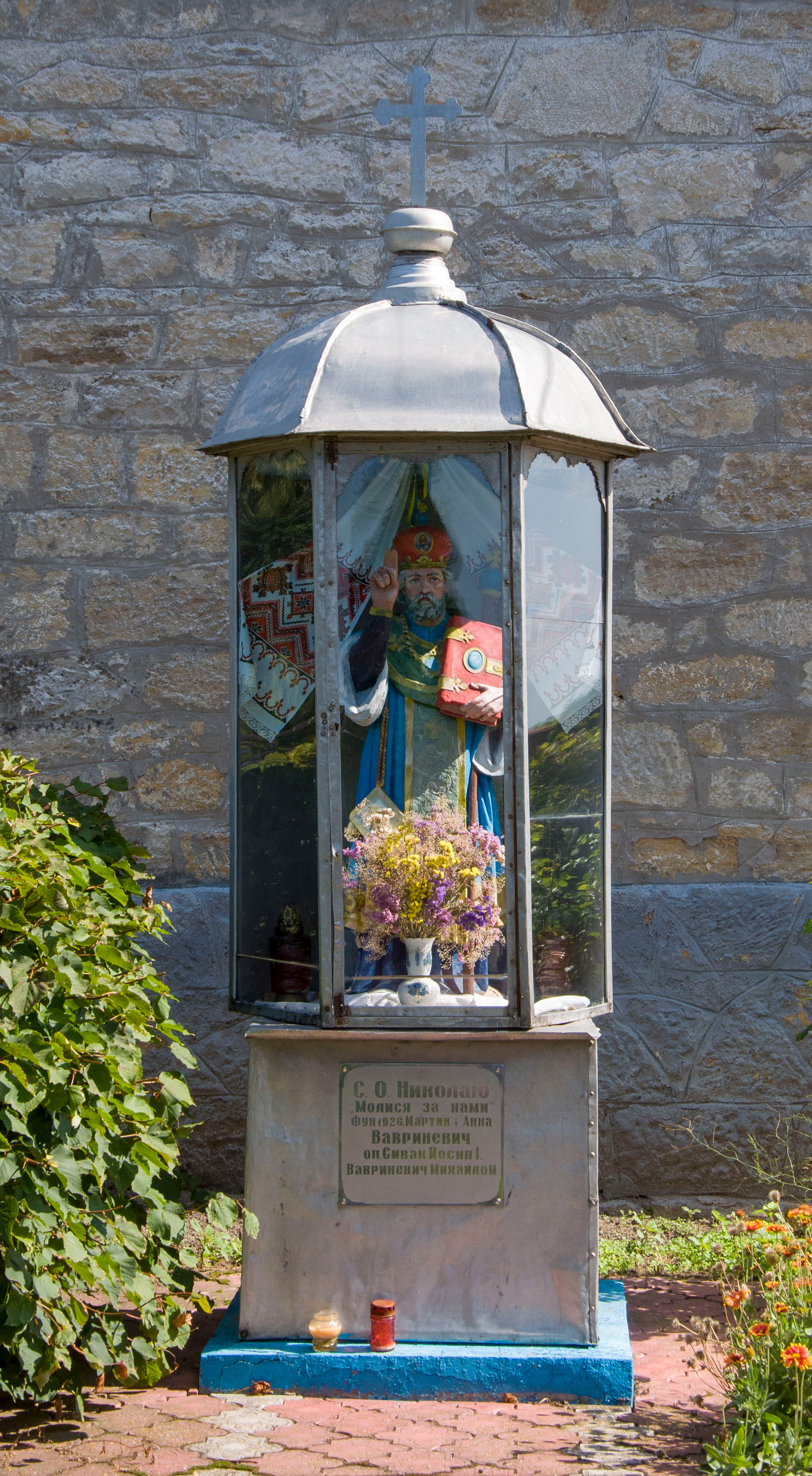 Фігура св. Миколая на територія православного храму в селі Шманьківці Чортківського району Тернопільської області України.